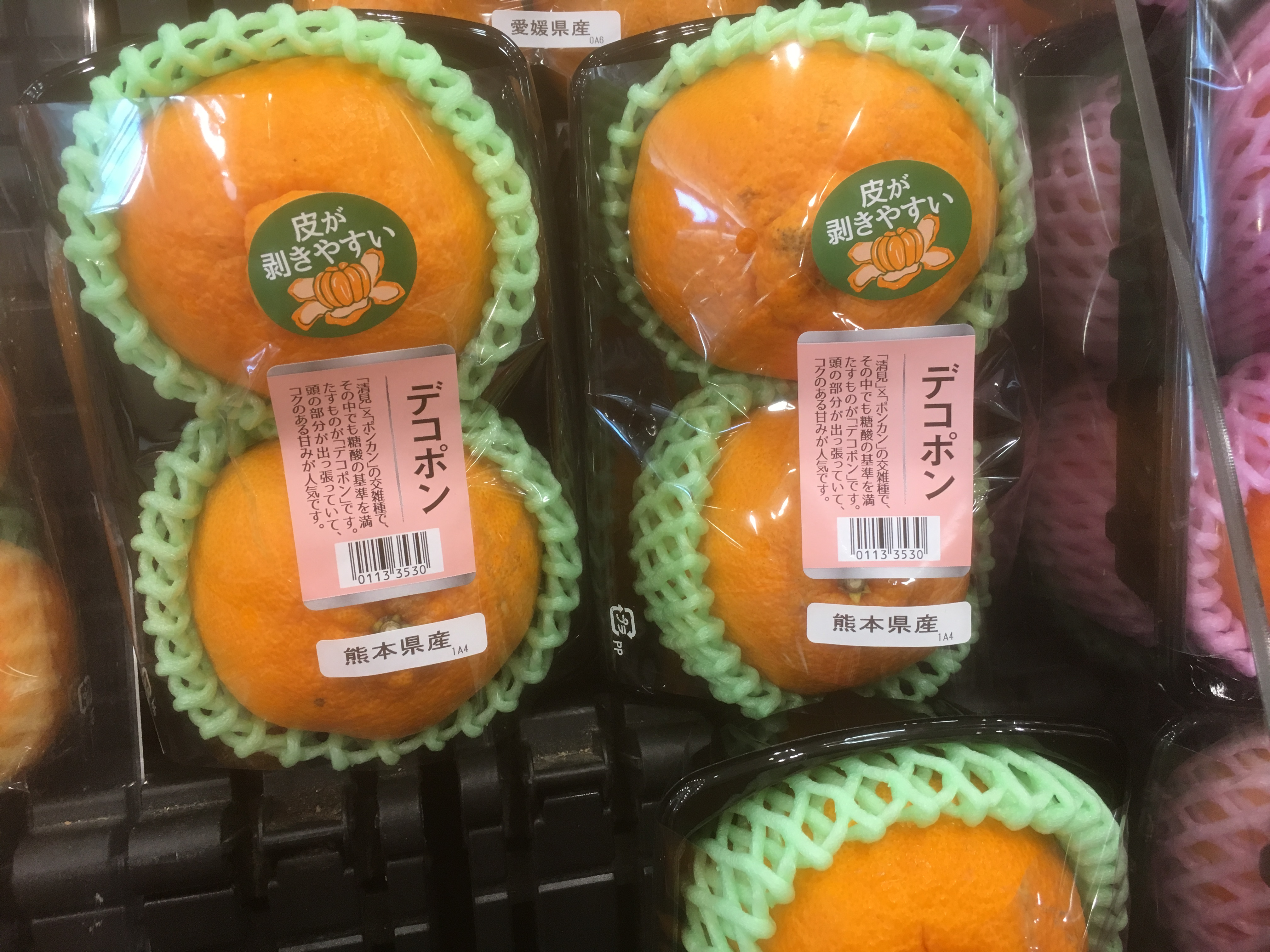 デコポン (dekopon, sumo mandarins)